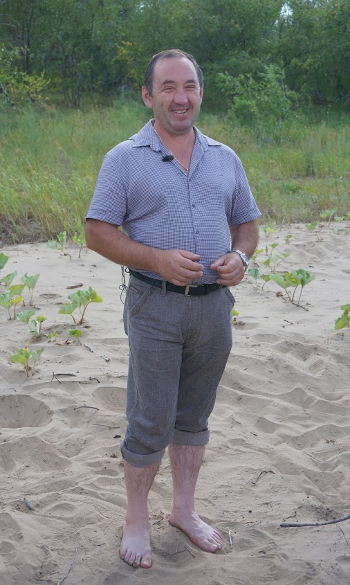 Юрий Краснобаев, директор Жигулёвского заповедника, на заповедном волжском озере Серёдыш.